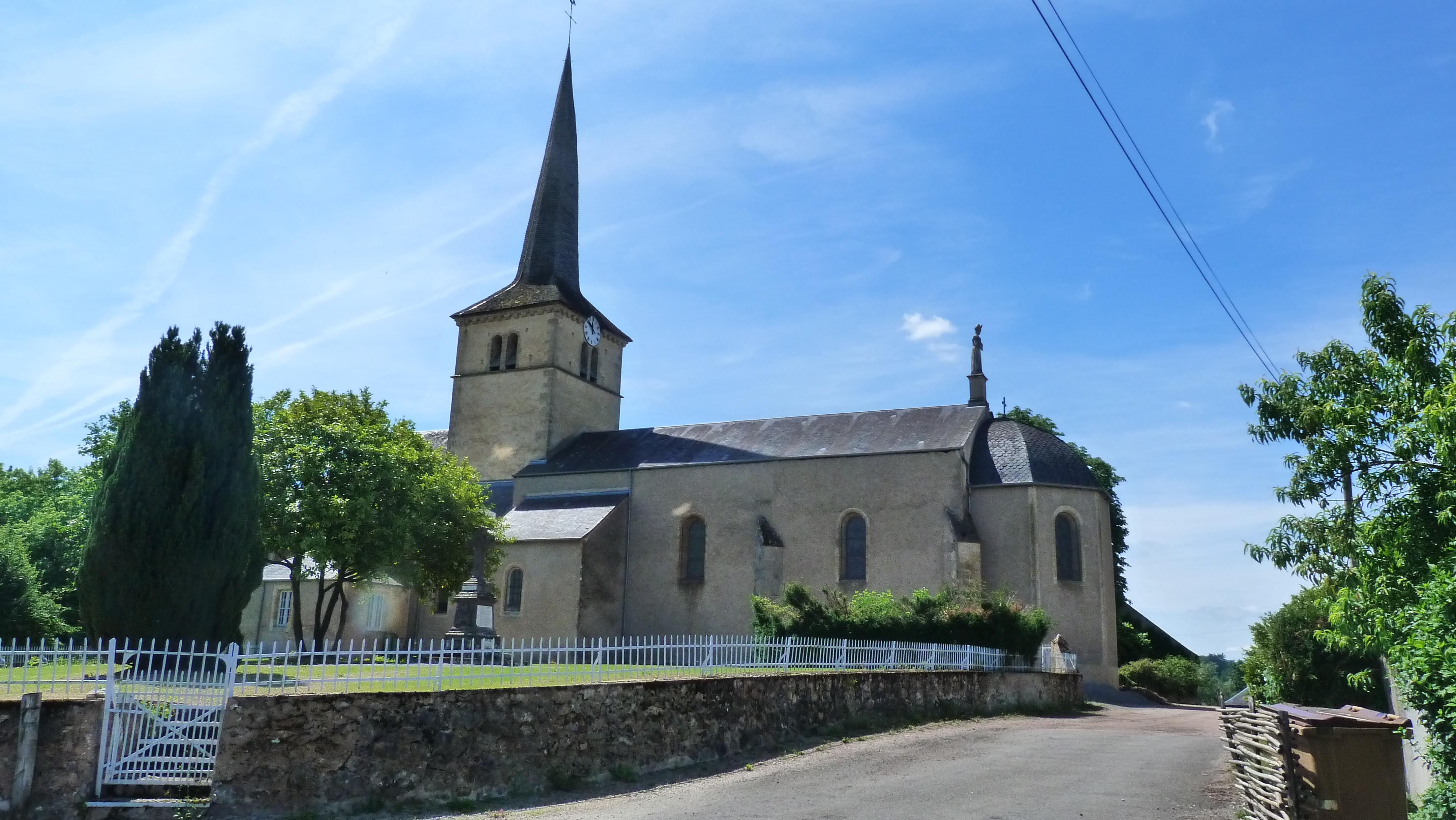 Preĝejo de Sermages